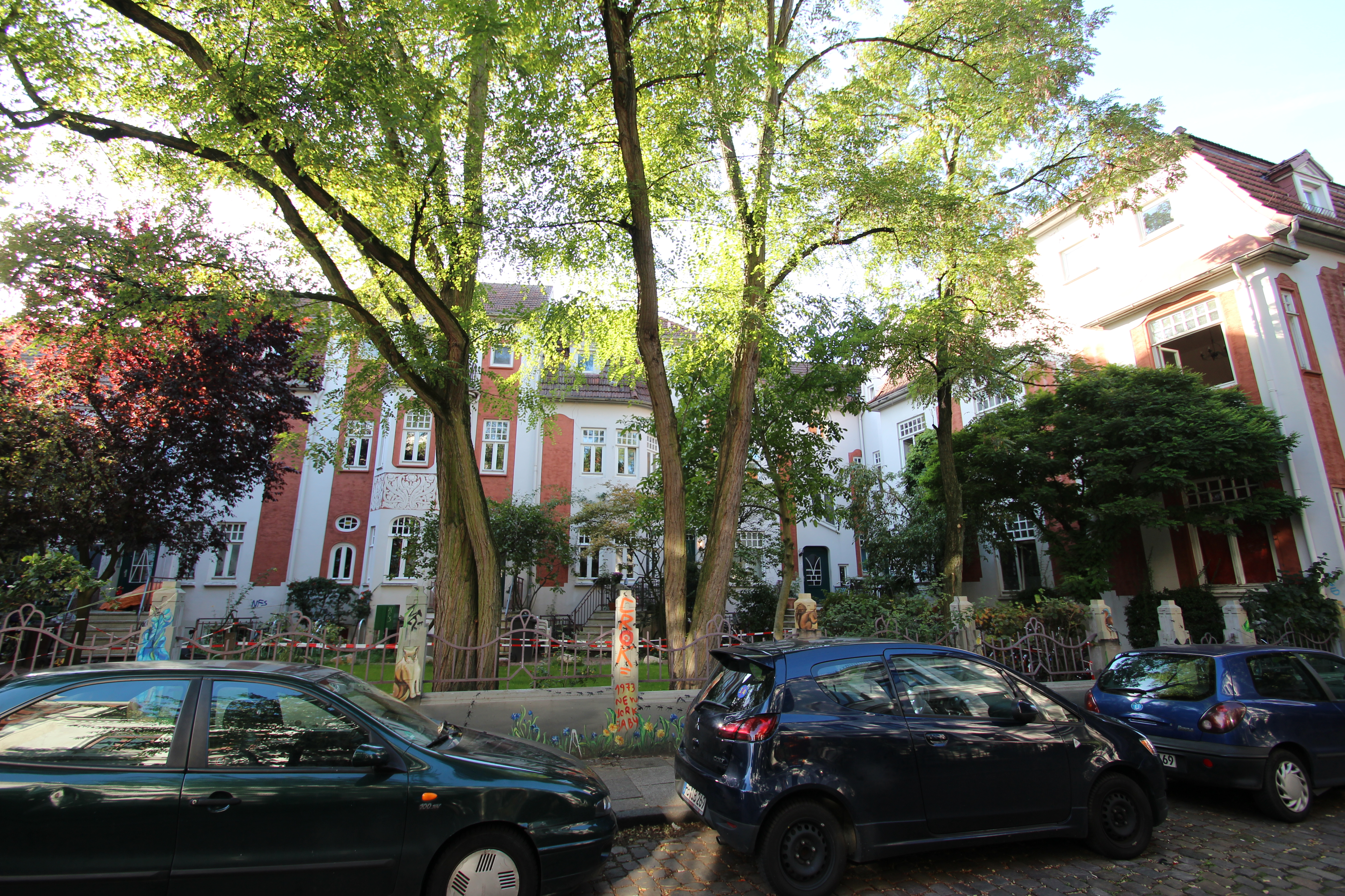 Wiener Hof in Bremen, WeberstraßeDie Gesamtanlage ist ein geschütztes Kulturdenkmal in der Freien Hansestadt Bremen, mit der Nr. 1235 beim Landesamt für Denkmalpflege registriert.